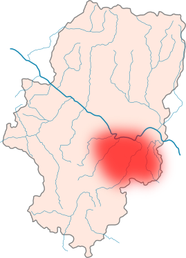 Situación aproximada del Bajo Aragón histórico dentro de Aragón